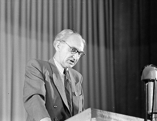 Original image description from the Deutsche Fotothek Portrait Heinrich Raus am Rednerpult bei der Eröffnung der Herbstmesse 1950